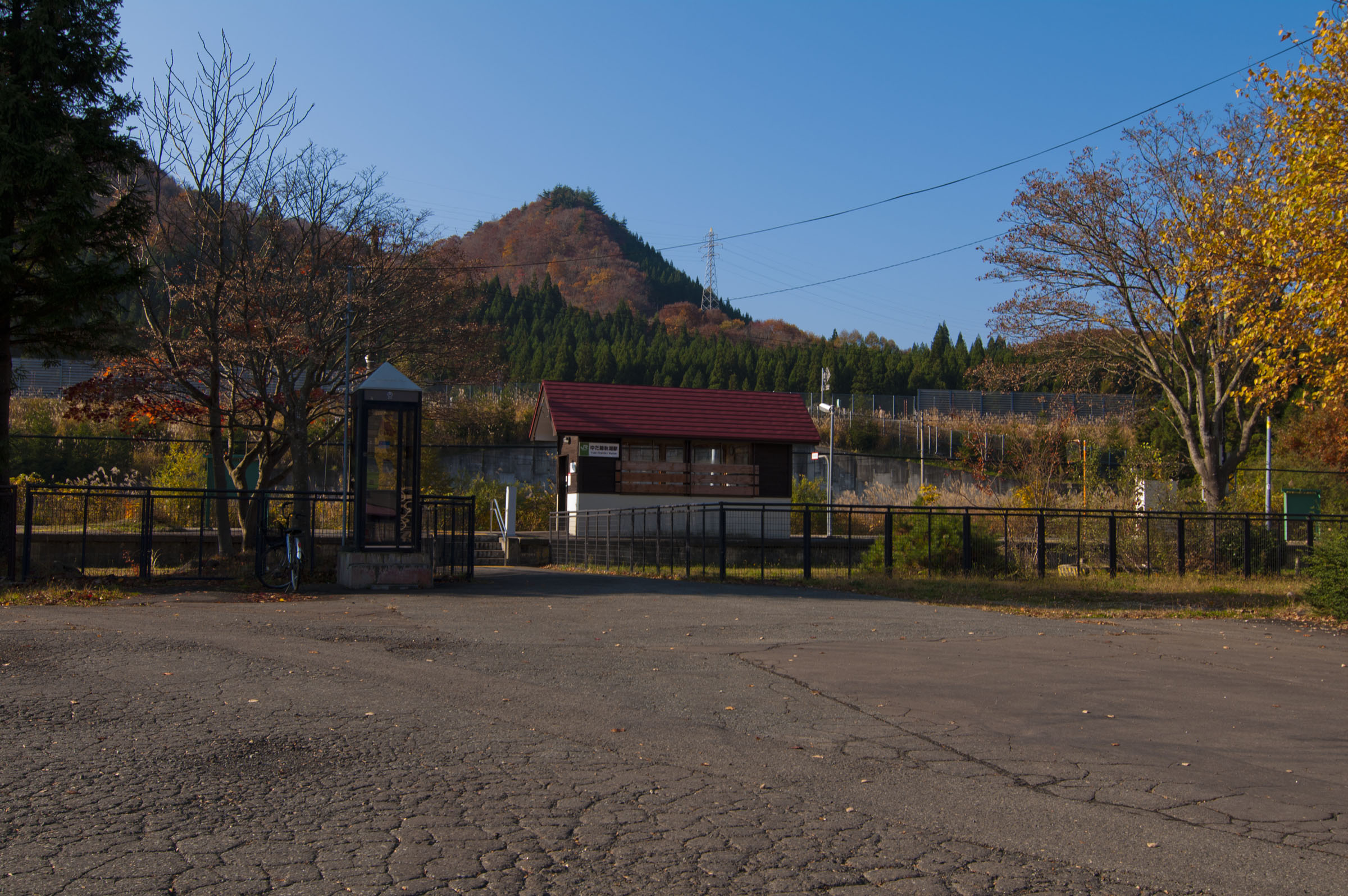 東日本旅客鉄道北上線ゆだ錦秋湖駅